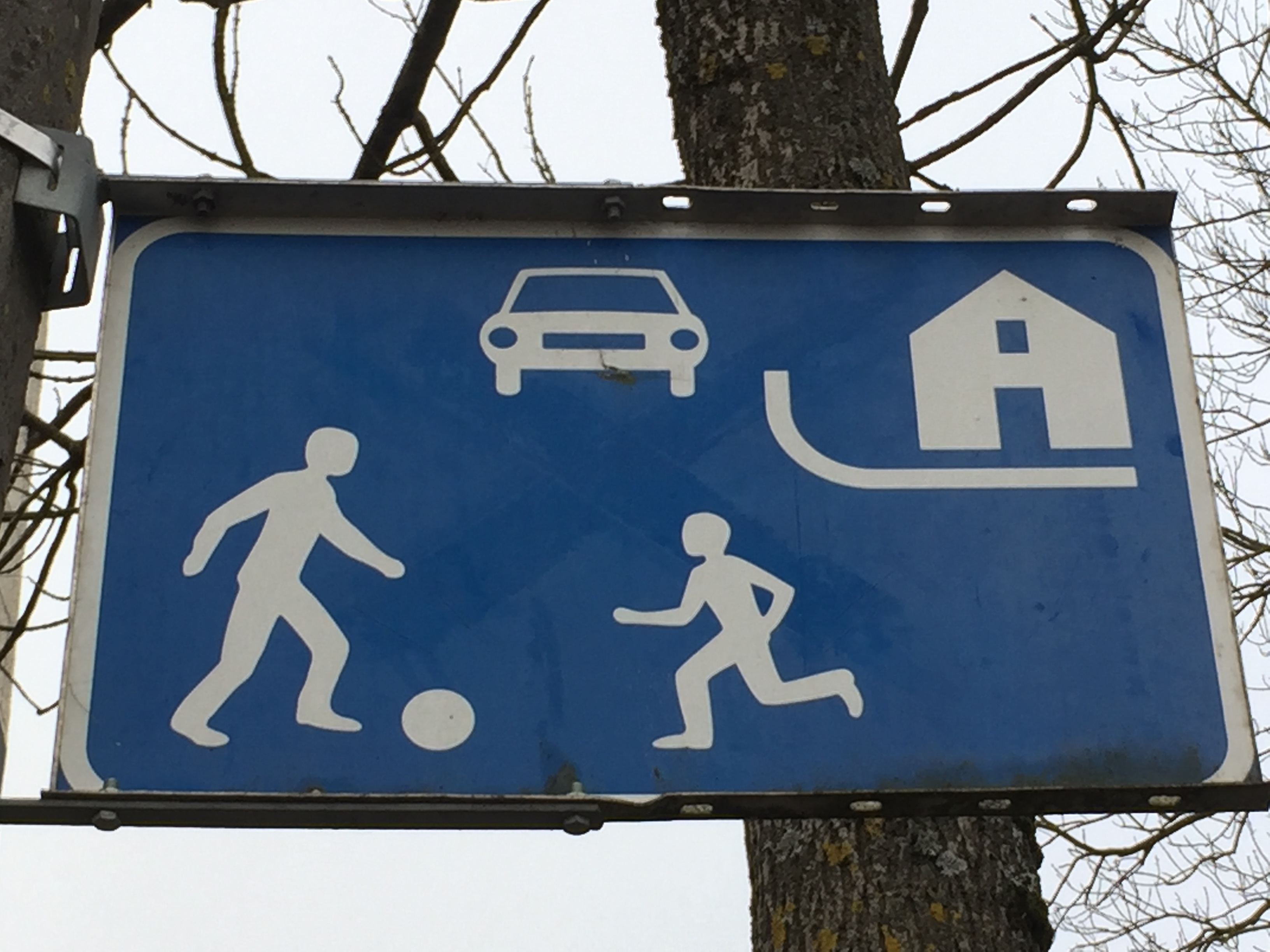 Eestis kasutatav liiklusmärk õueala märgistamiseks